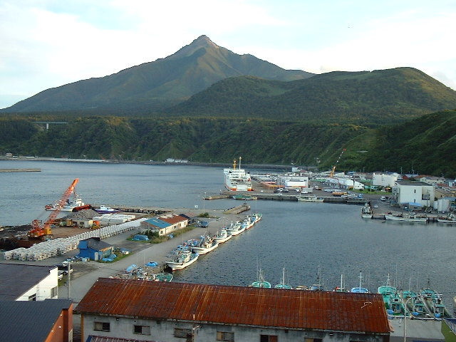 ペシ岬からの利尻岳